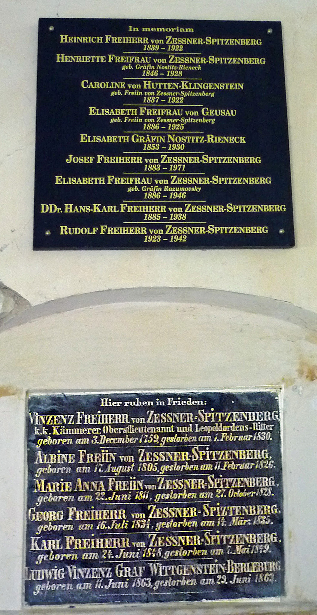 Tafel der Freiherren von Zessner-Spitzenberg in der Gruftkapelle der Pfarrkirche in Liebeschitz (Liběšice) - ehem. Patronatsherren